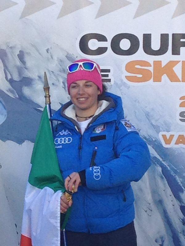 Valentina Greggio sul podio dopo aver vinto la tappa di Coppa del Mondo di Vars (Francia) il 25/01/2014